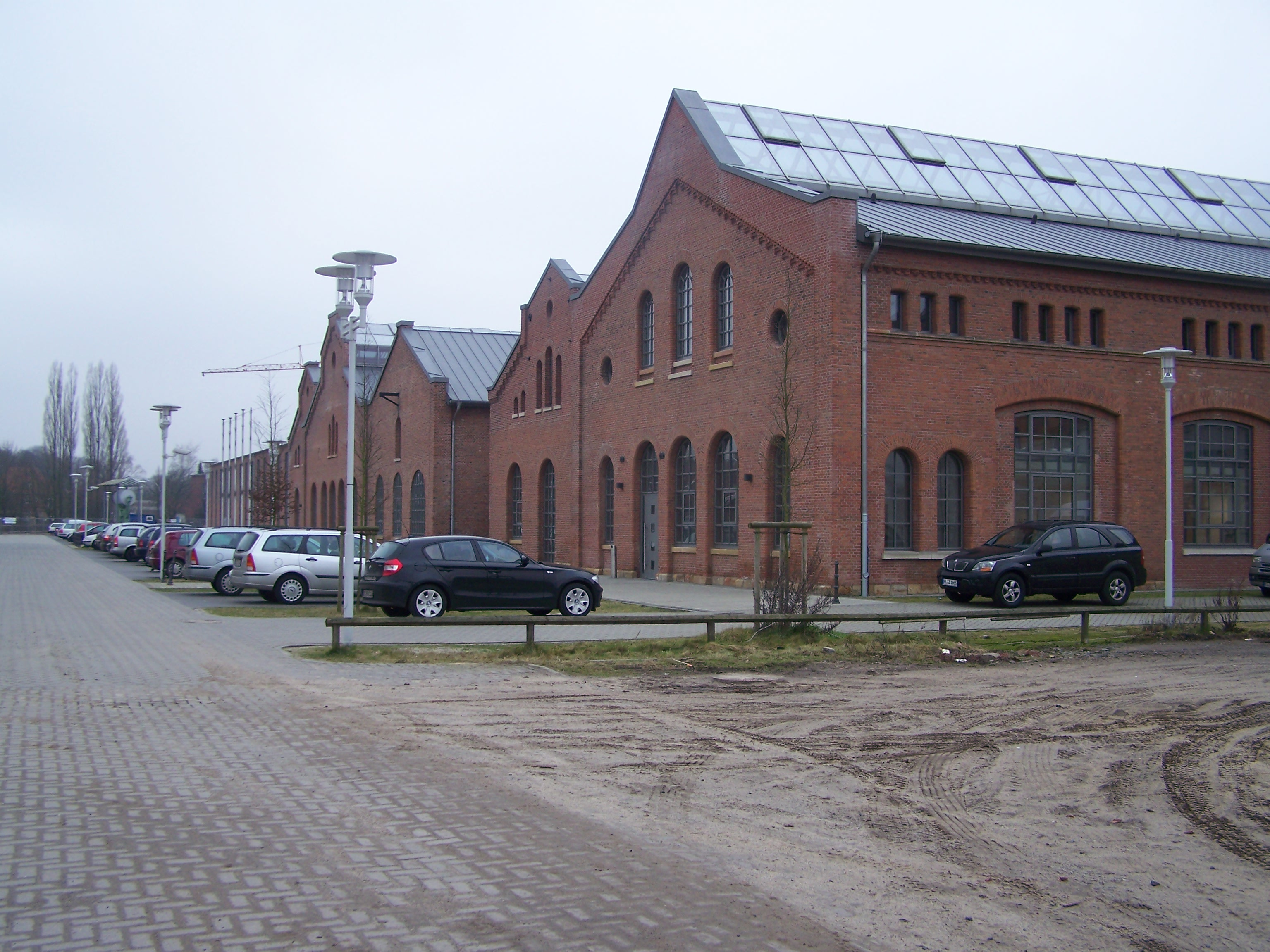 Ausbesserungswerk Lingen Halle 3